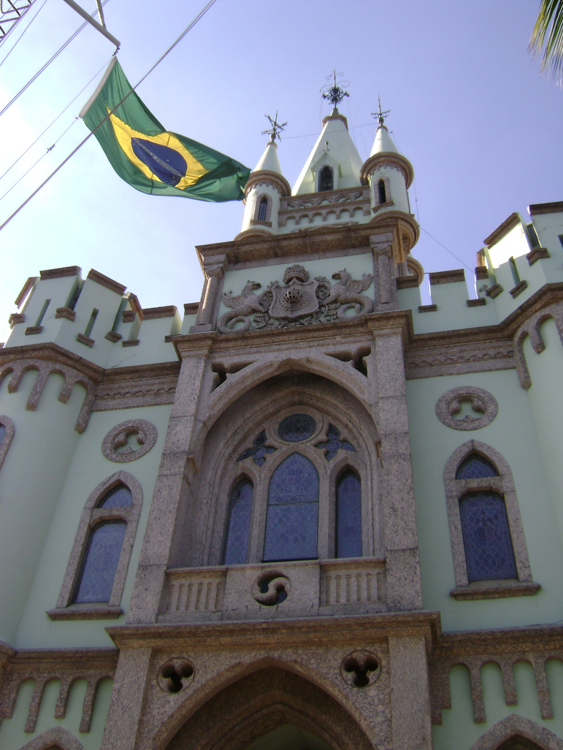 Fachada de edificação na Ilha Fiscal, na cidade do Rio de Janeiro, Brasil.